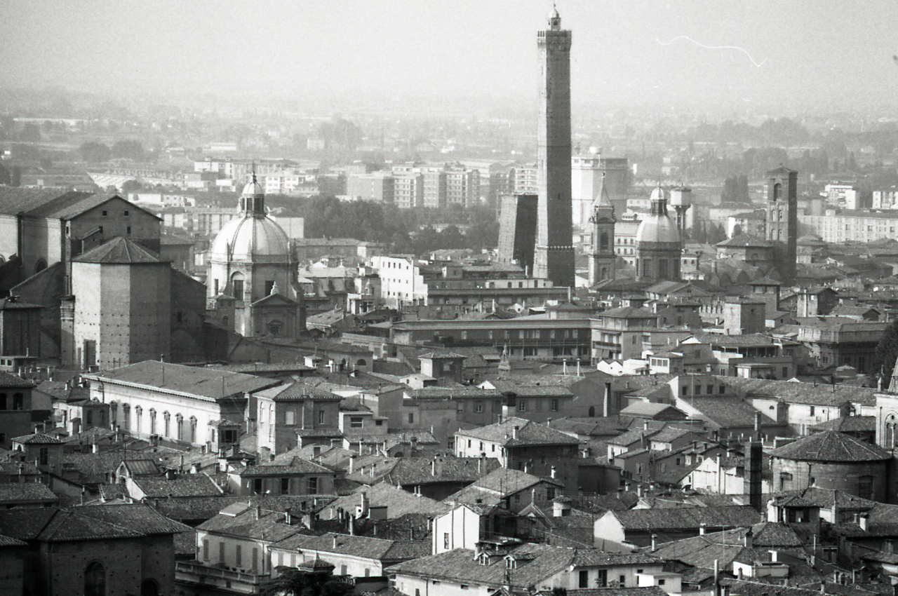 Servizio fotografico : Bologna, 1968 / Paolo Monti. - Strisce: 7, Fotogrammi complessivi: 38 : Negativo b/n, gelatina bromuro d'argento/ pellicola ; 35 mm. - ((I fotogrammi hanno una doppia numerazione. . - Sul portanegativi: Nikon Agfa 21. - Sul dorso del portanegativi Monti specifica: "Bologna medievale, arca di Piazza San Domenico. Panorami e giardini pubblici. Santo Stefano. Alfa". - Occasione: Documentazione per la pubblicazione di :"Andrea EMILIANI (a cura di), Questa Romagna: storia, costumi e tradizioni, Bologna, Edizioni Alfa, 1963". - Fonte: Monografia di Emiliani, Andrea: Questa Romagna: storia, costumi e tradizioni, Bologna, Edizioni Alfa (1963?), presso Archivio Paolo Monti